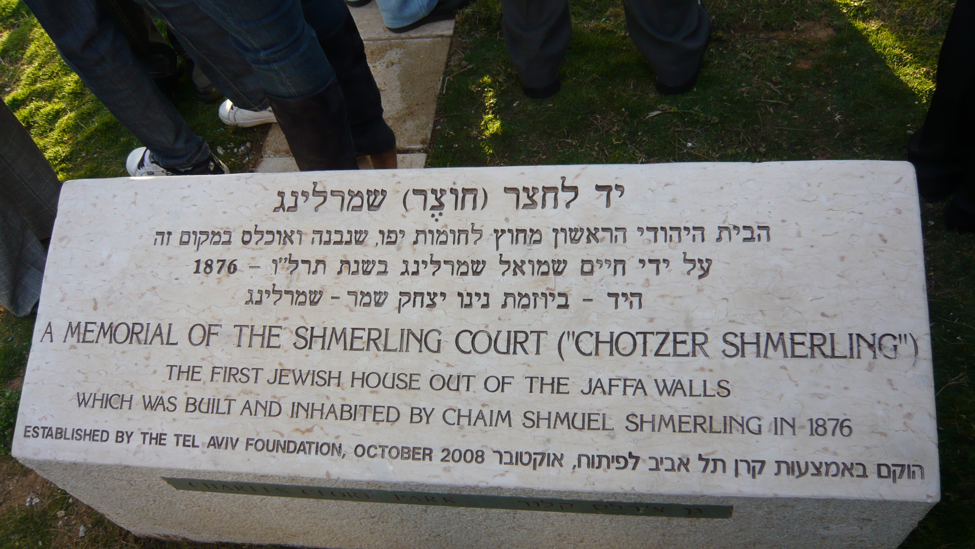 יד לחצר שמרלינג - מראשוני הבתים שנבנו מחוץ לחומות יפו, אזור מנשיה